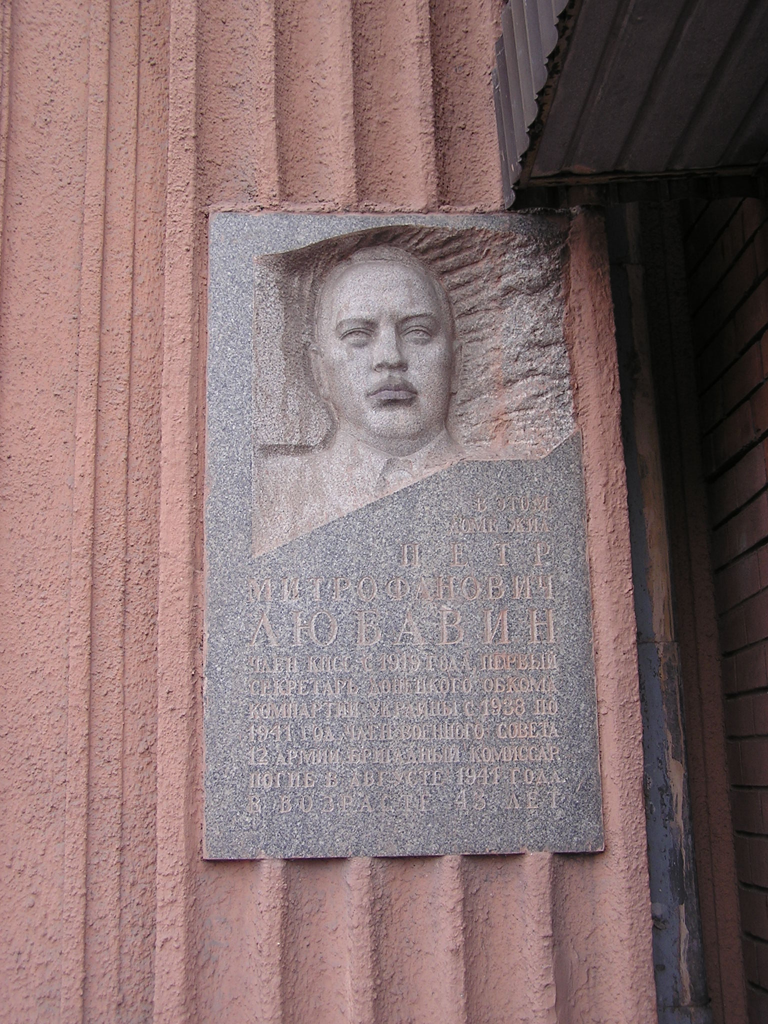 Мемориальная доска в Донецке